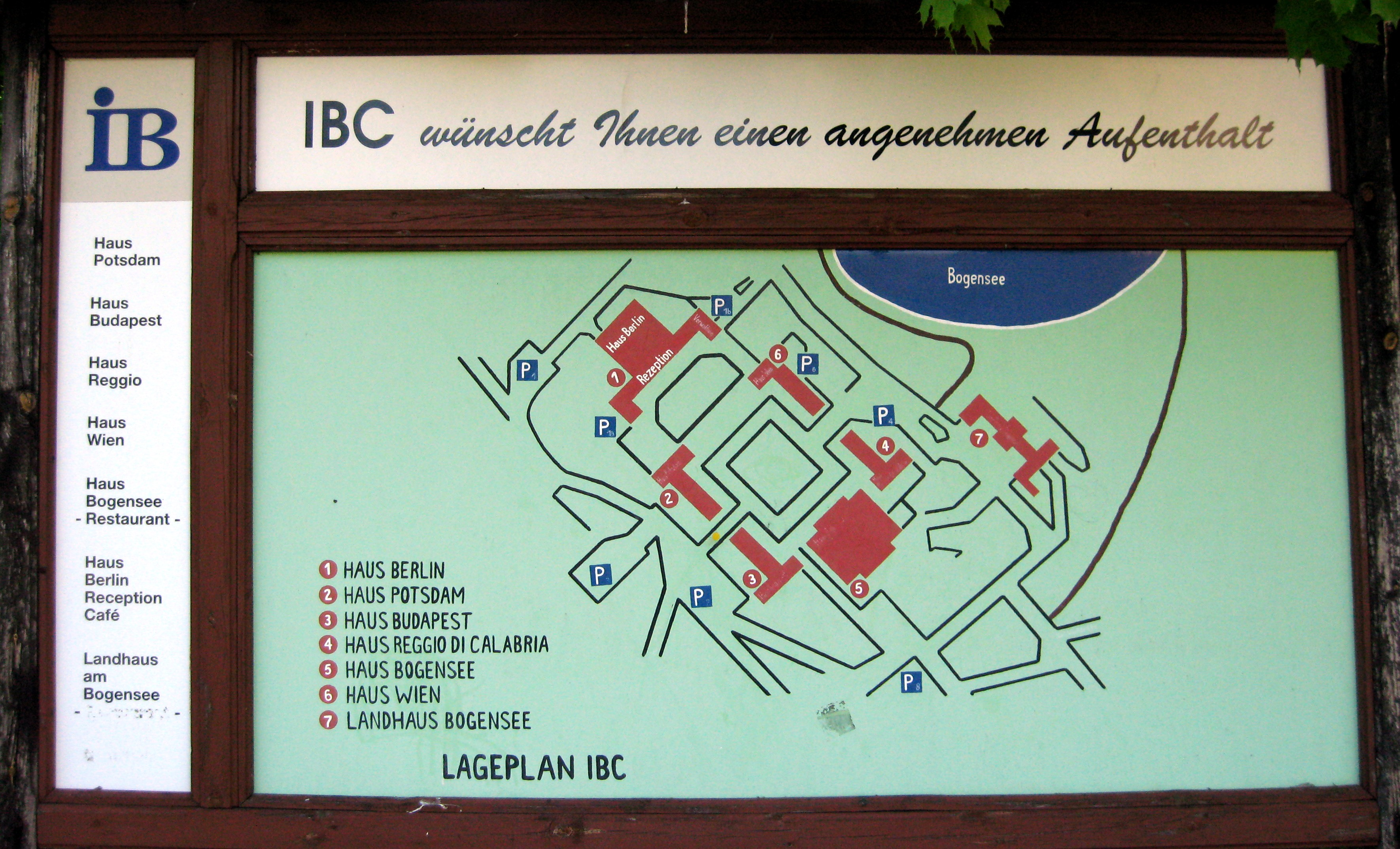 Lageplan des ehem. IBC Bogensee (aufgestellte Informationstafel auf dem Gelände), Lanke, Gemeinde Wandlitz, Landkreis Barnim, Land Brandenburg, Deutschland